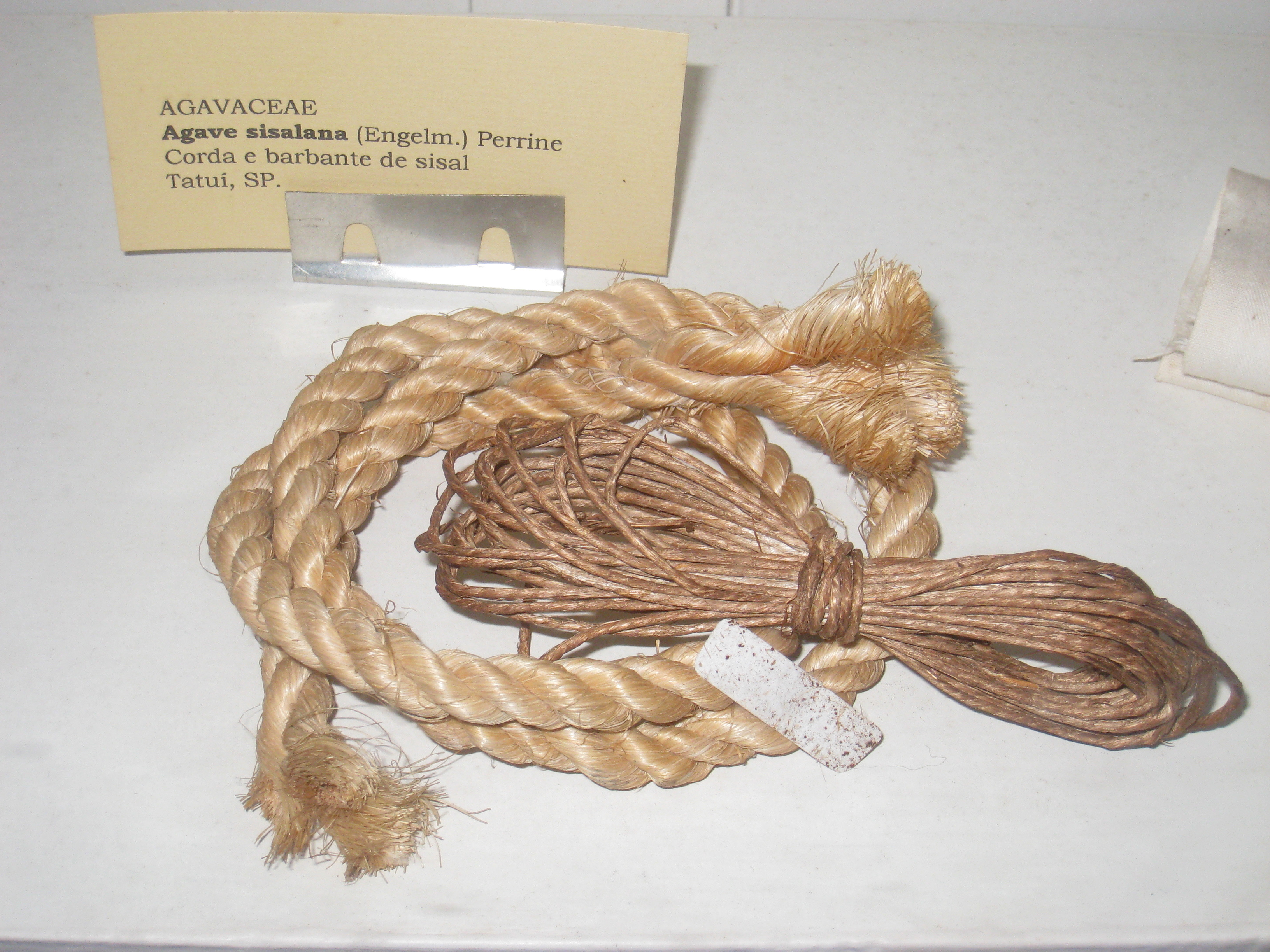 Agave sisalana specimen in the Museu Botânico Dr. João Barbosa Rodrigues, Jardim Botânico de São Paulo, São Paulo City, SP, Brazil.